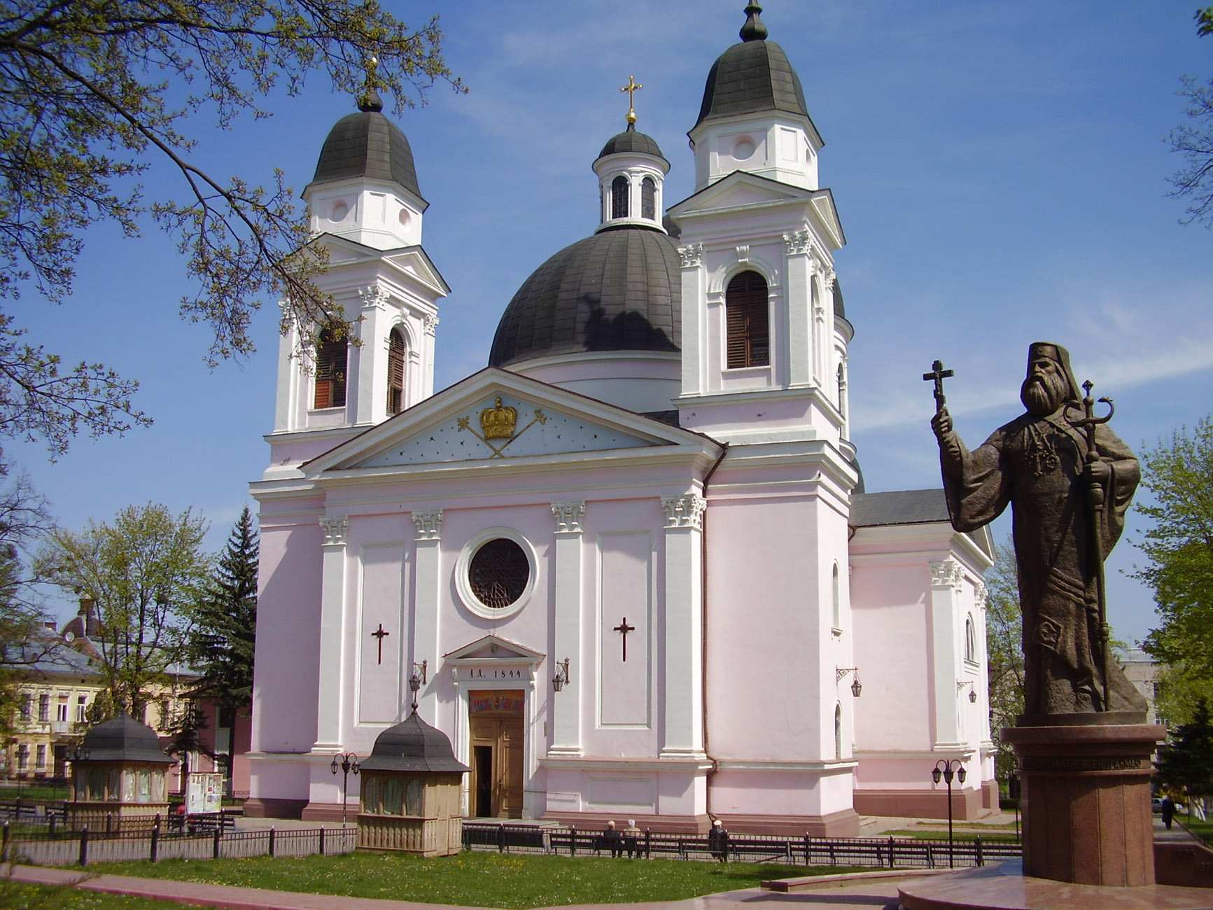 Кафедральный собор и памятник митрополиту Гакману в Черновцах